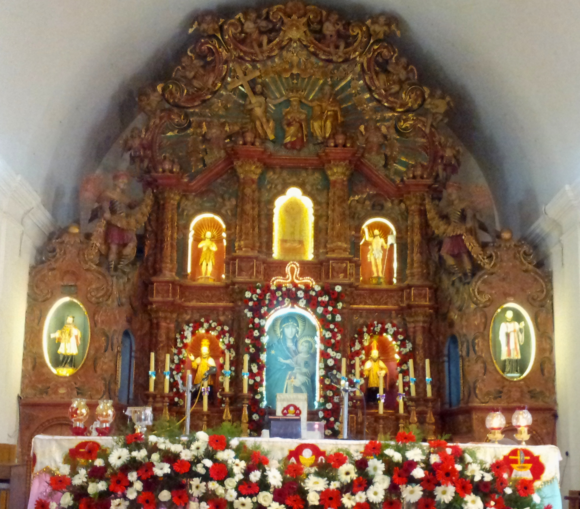 വെച്ചൂർ പള്ളി അൾത്താര